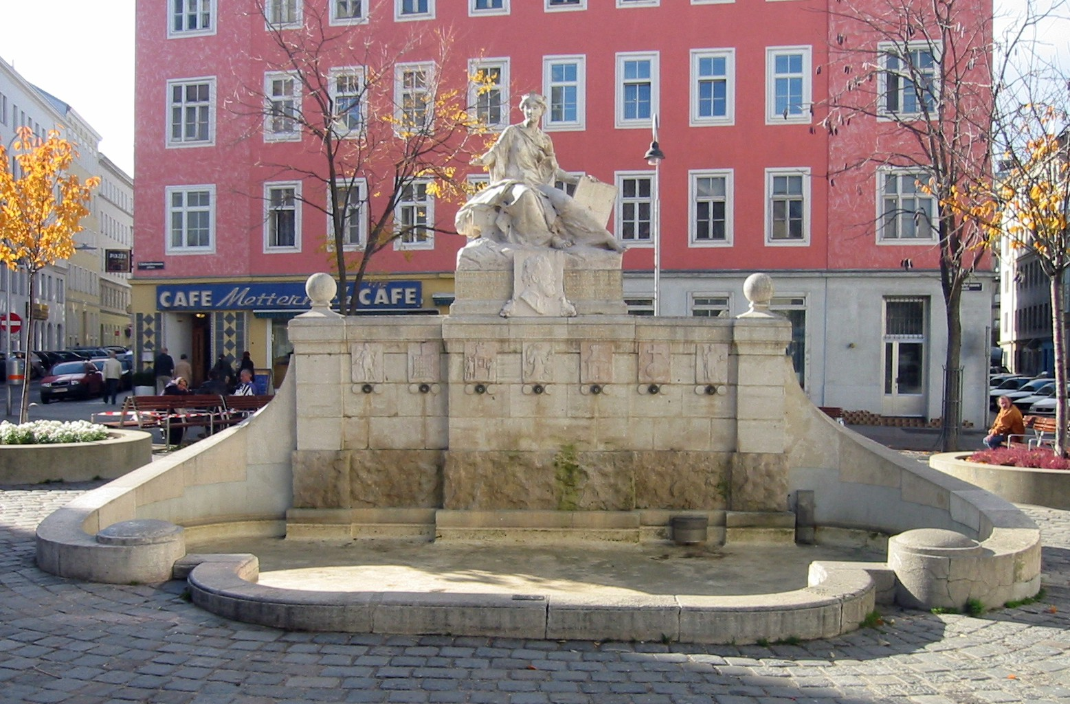 Wien, Siebenbrunnen